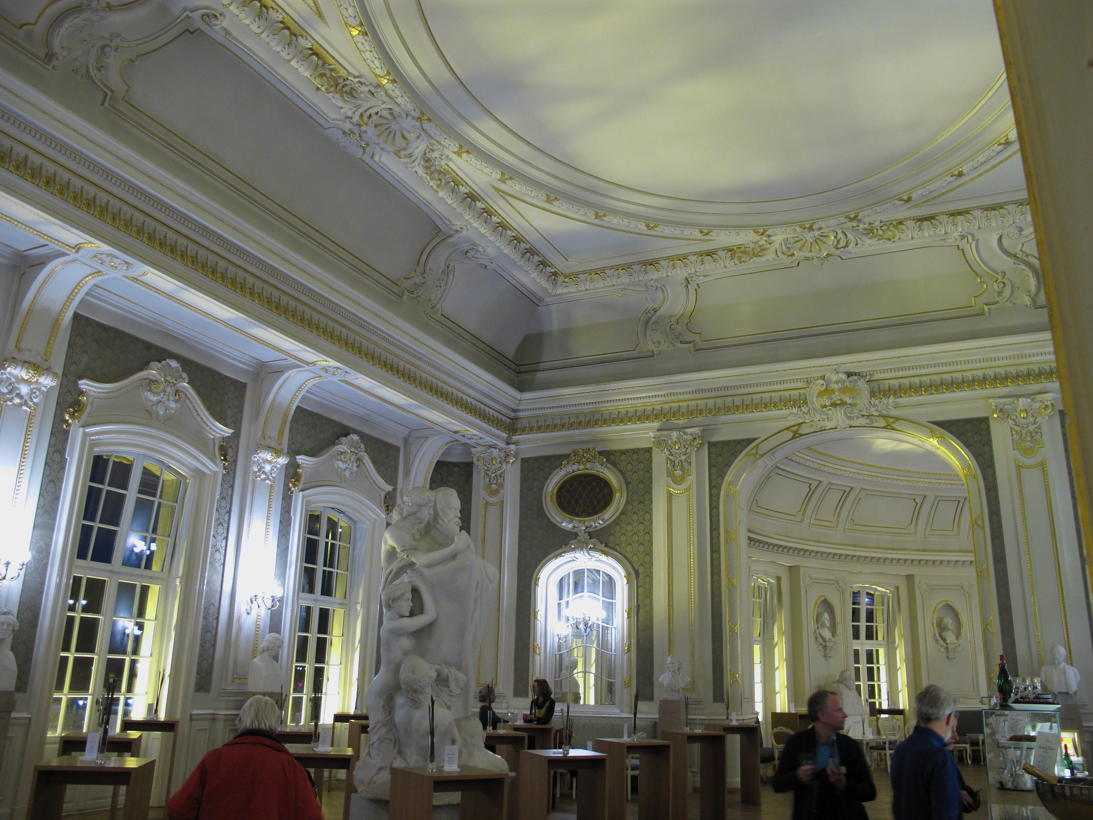 Café neben dem Großen Saal der Laeiszhalle (Musikhalle) in Hamburg